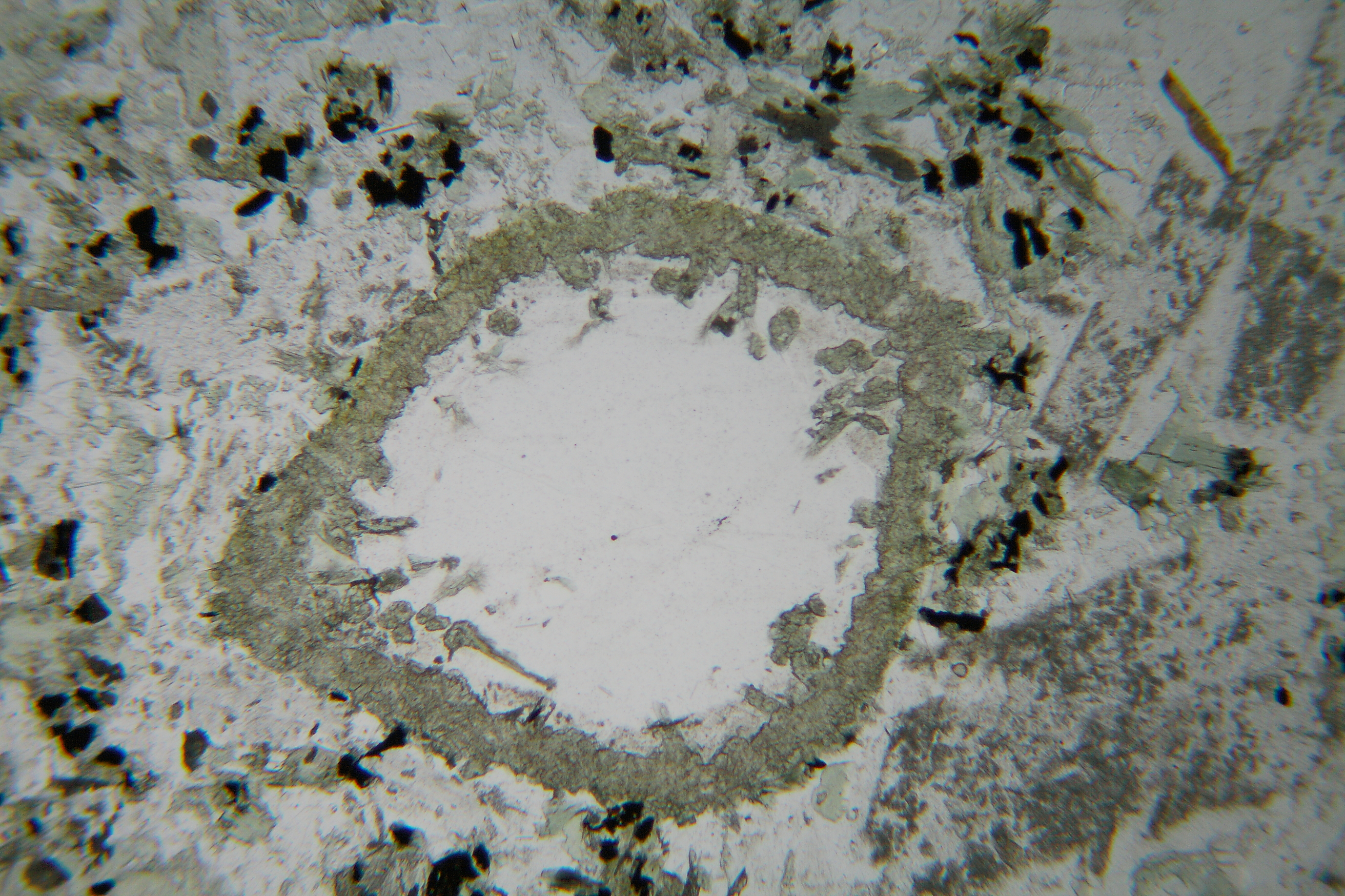 Ocellus (mit Amphibol ummantelter Quarzkristall) in Granodiorit